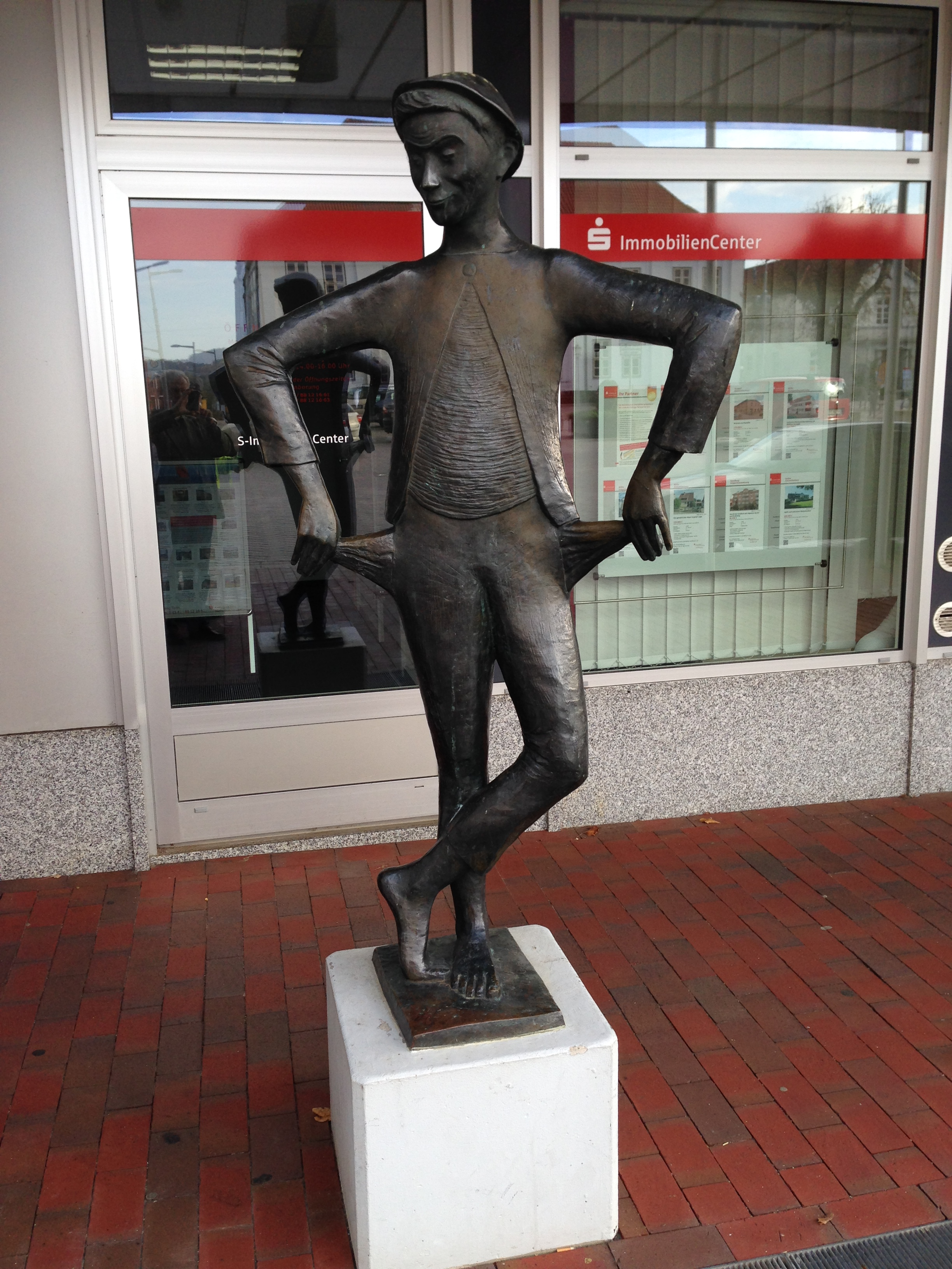 Skulptur vor der Sparkasse in Ratzeburg 2014: Der Taschenmann von Karlheinz Goedtke (1957)